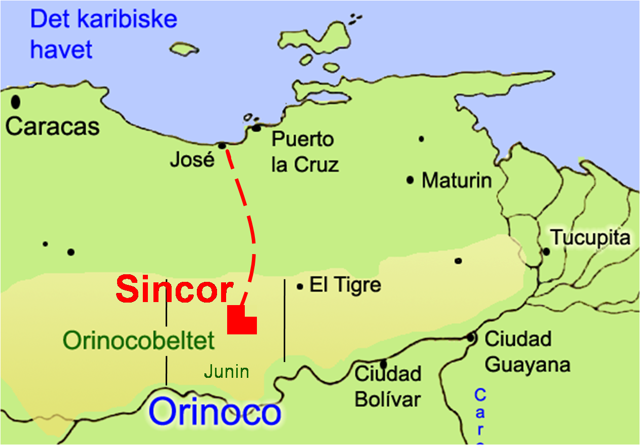 Skildring: Kartskisse av nordaustre del av Venezuela med omrissteikning av Orinocobeltet og området for utvinning av petroleum i Sincorprosjektet. Illustrasjon, proporsjonar kan vere feil. Kjelder: Eiga teikning, basert på Kontur av kysten frå dette kartet (Wikimedia Commons, PD, opphavleg frå CIA) Illustrasjon på side 8 som syner plassering av utvinningsområdet. Presentasjonen av Chris W. Baynard Lisens: Grafen kan brukast fritt som offentleg eigedom (PD)}, eller om det ikkje er mulig etter norsk rett, etter vilkår i .